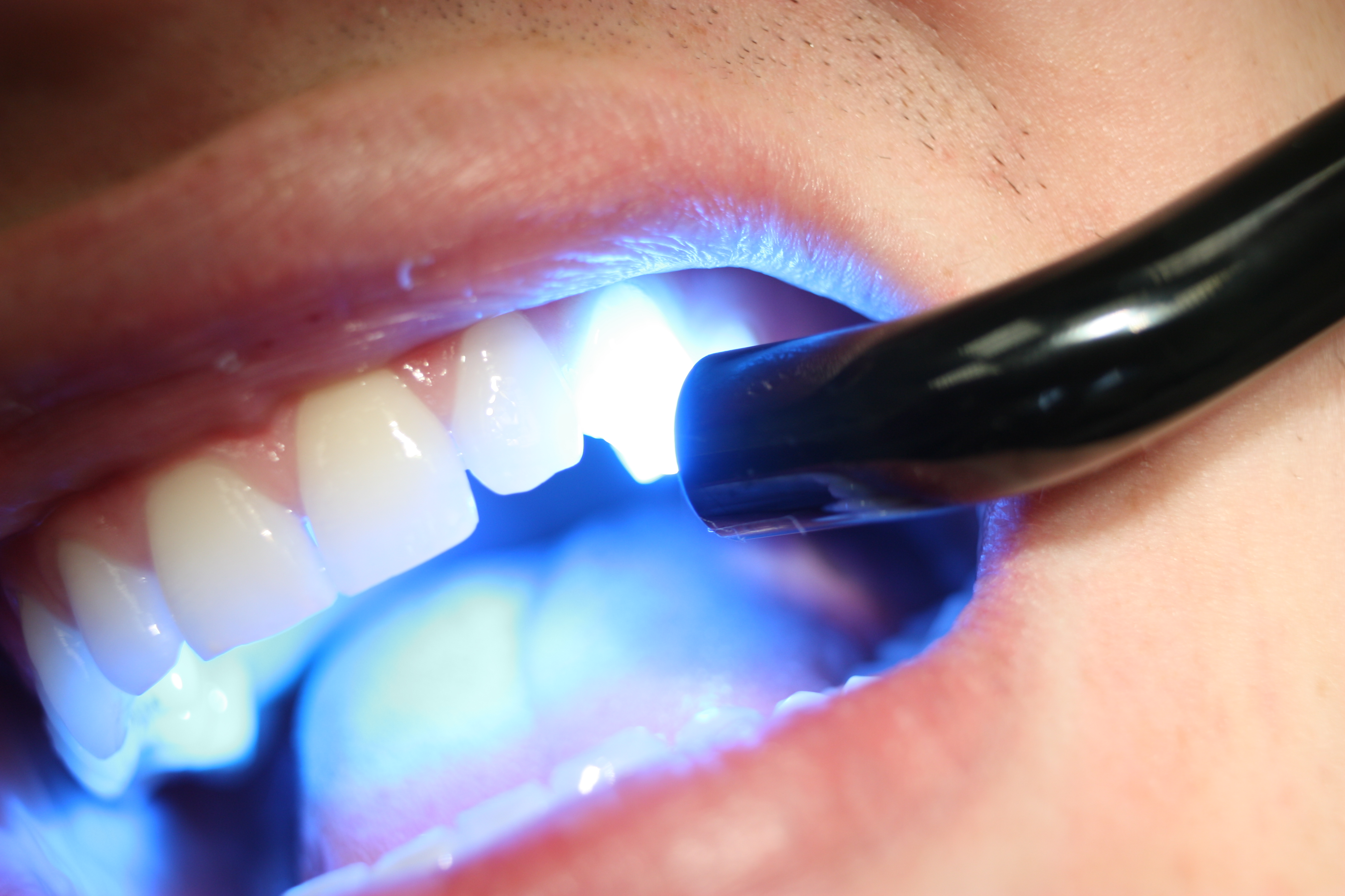 Polymerisation lamps